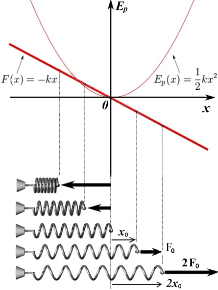 curva de Energía Potencial elástica y Fuerza correspondiente aplicado a la respuesta de bloque sujeto a un muelle.